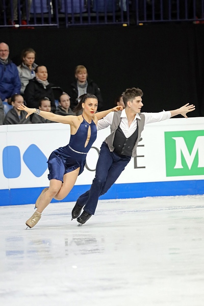 Лоренца Алессандрини / Пьер Суке (Франция) на чемпионате мира 2017